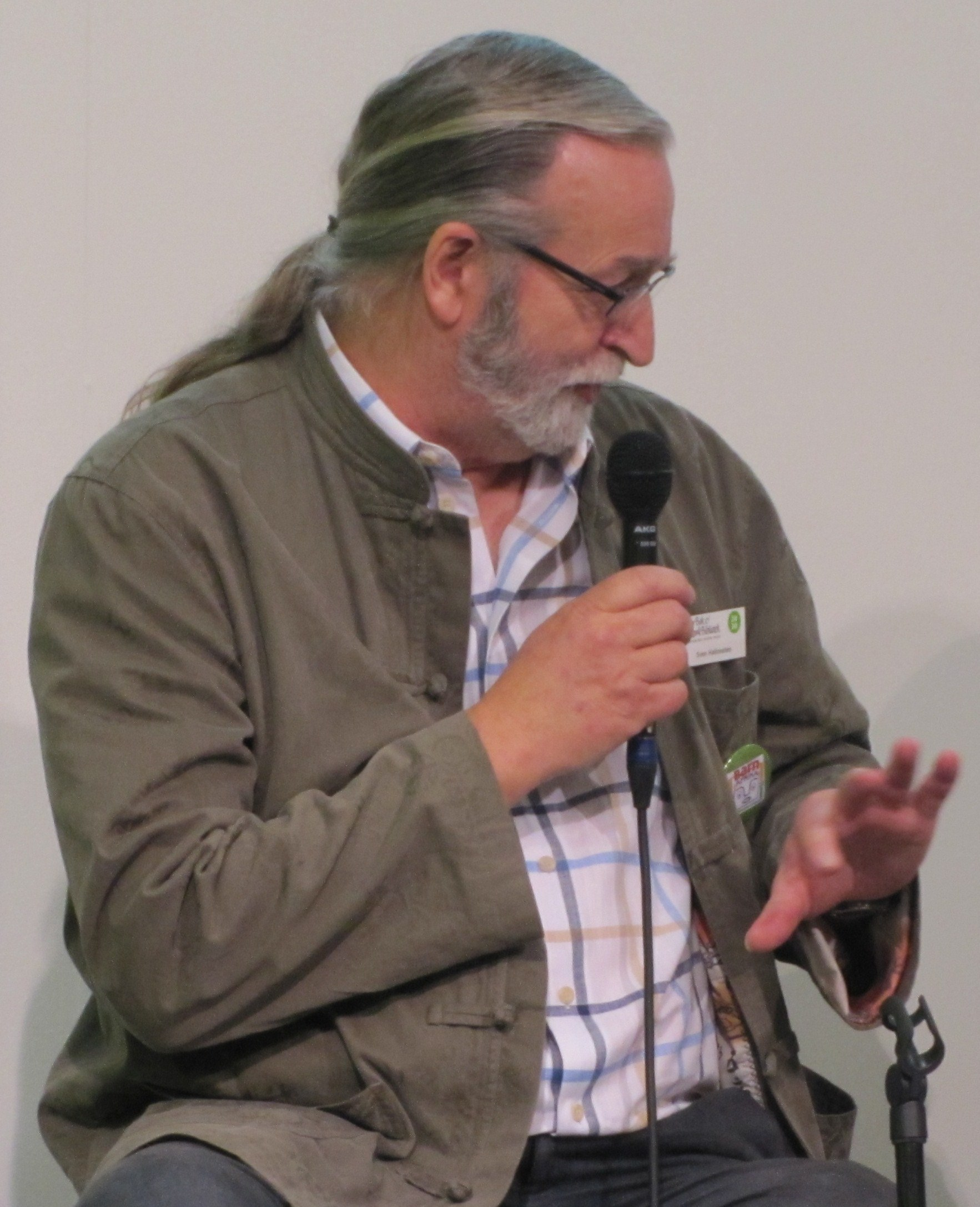 Bibliotekarien och redaktören Sven Hallonsten.